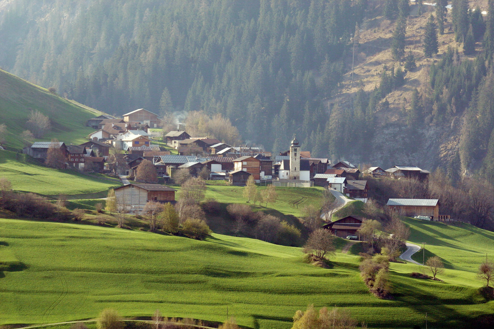 Sicht auf Duvin. Sonstiges